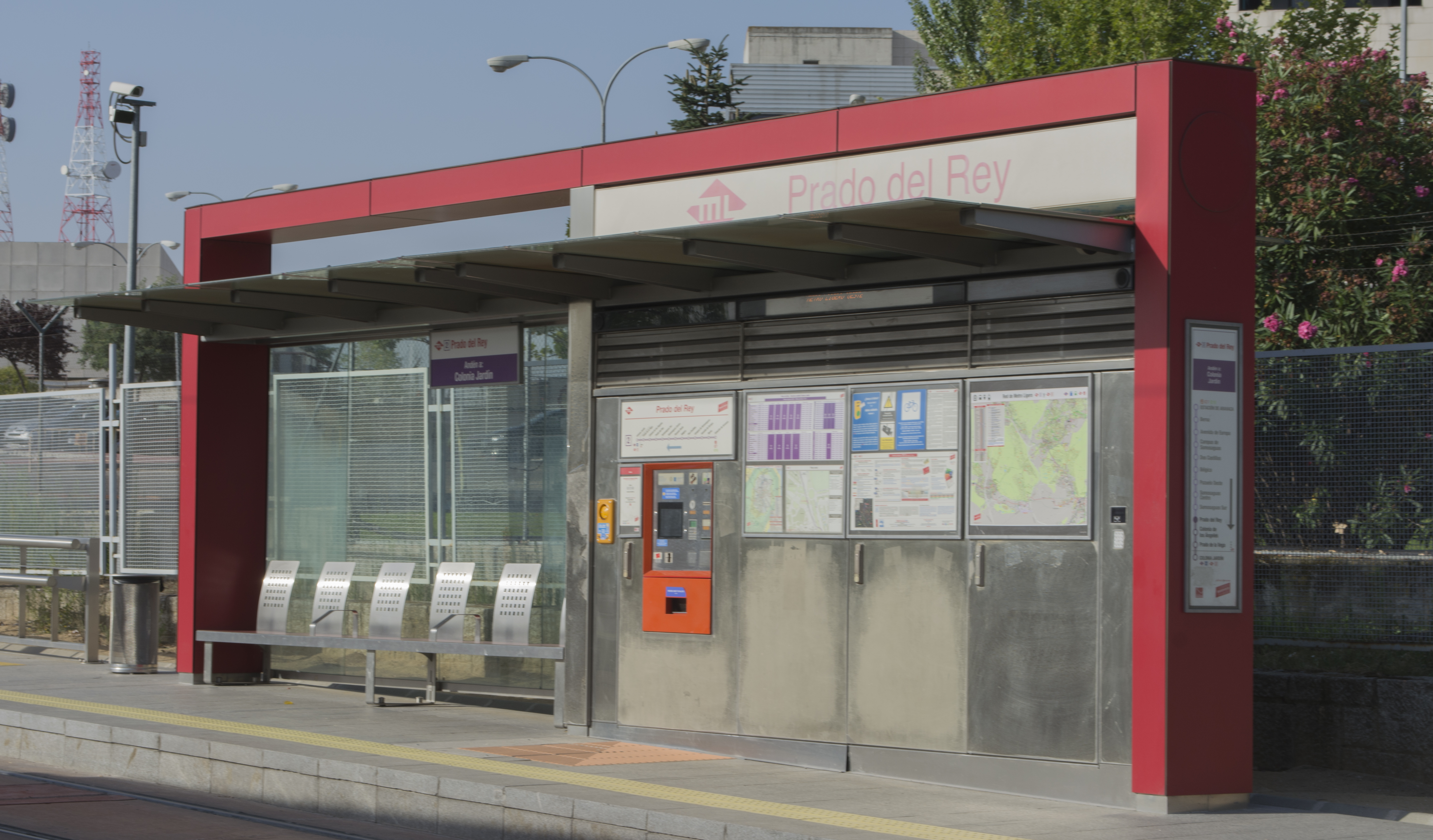 Andén de la estación Prado del Rey, de Metro Ligero Madrid, en dirección Colonia Jardín.